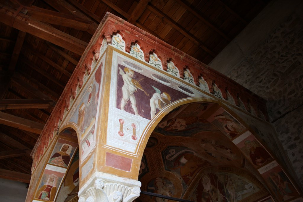 Ciborio della Chiesa di Santo Stefano a Bizzozero - particolare